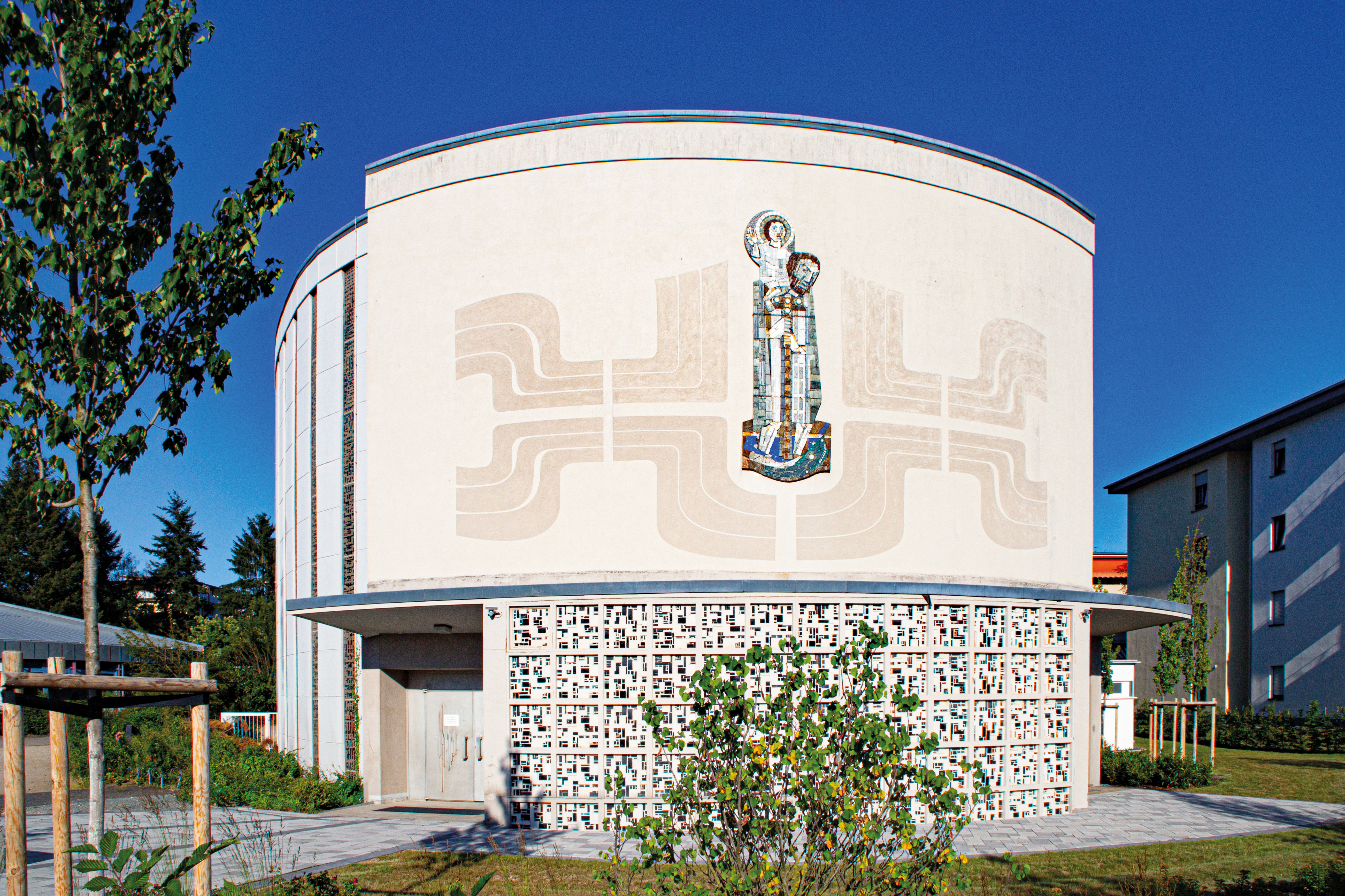 Katholische Kirche Gravenbruch. Foto: Friederike Mühleck